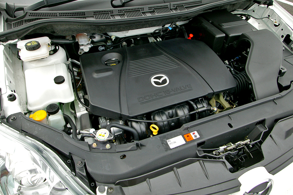 Mazda LF-DE I4 2.0L engine